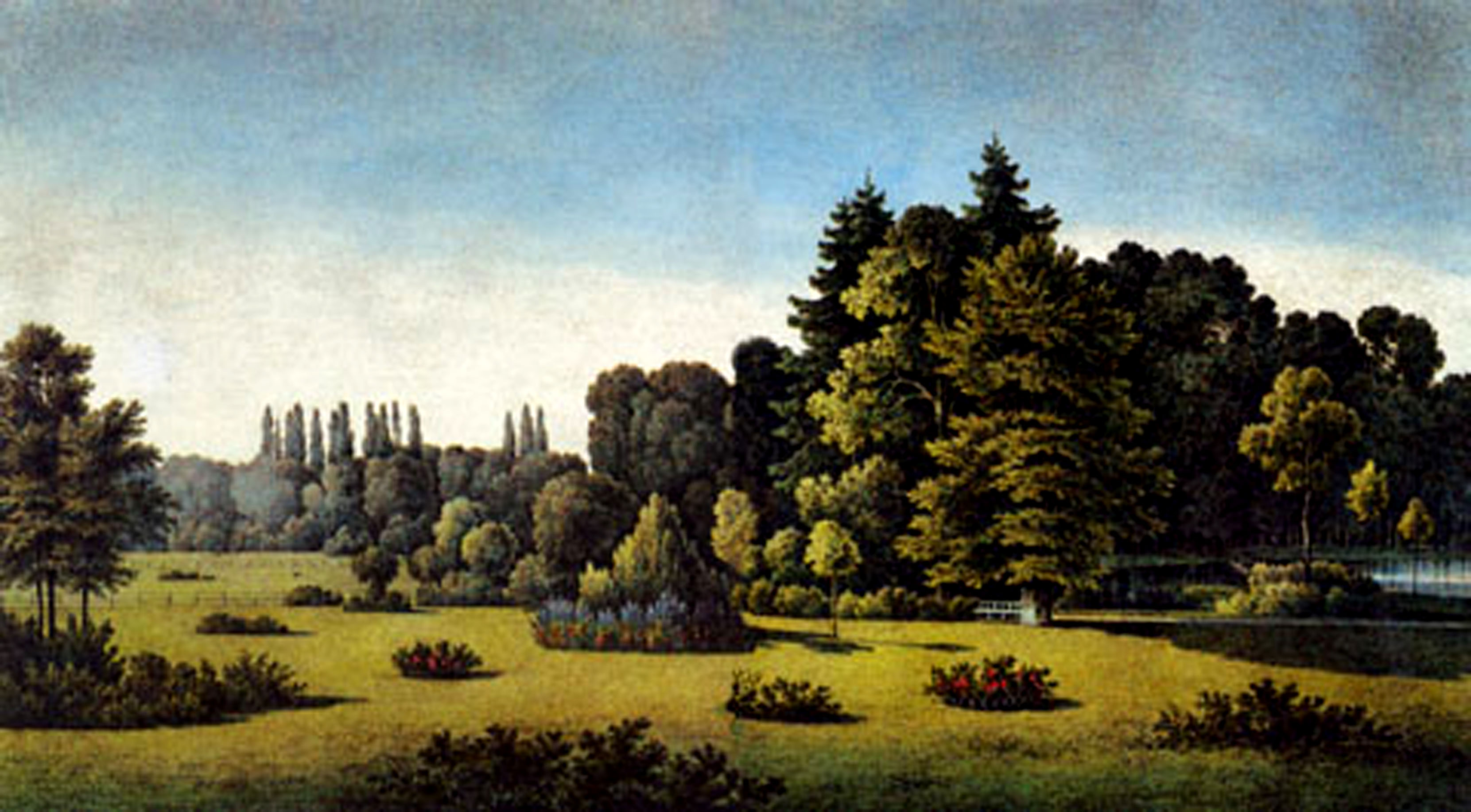 Gartengestaltung in Muskau nach Fürst Pücklers Angaben